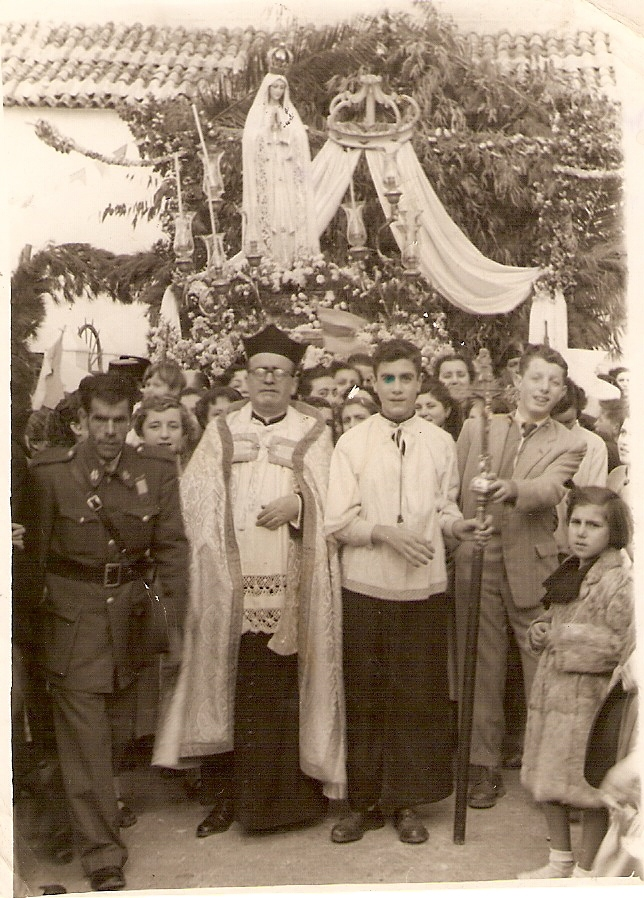 Romería religiosa 1953.